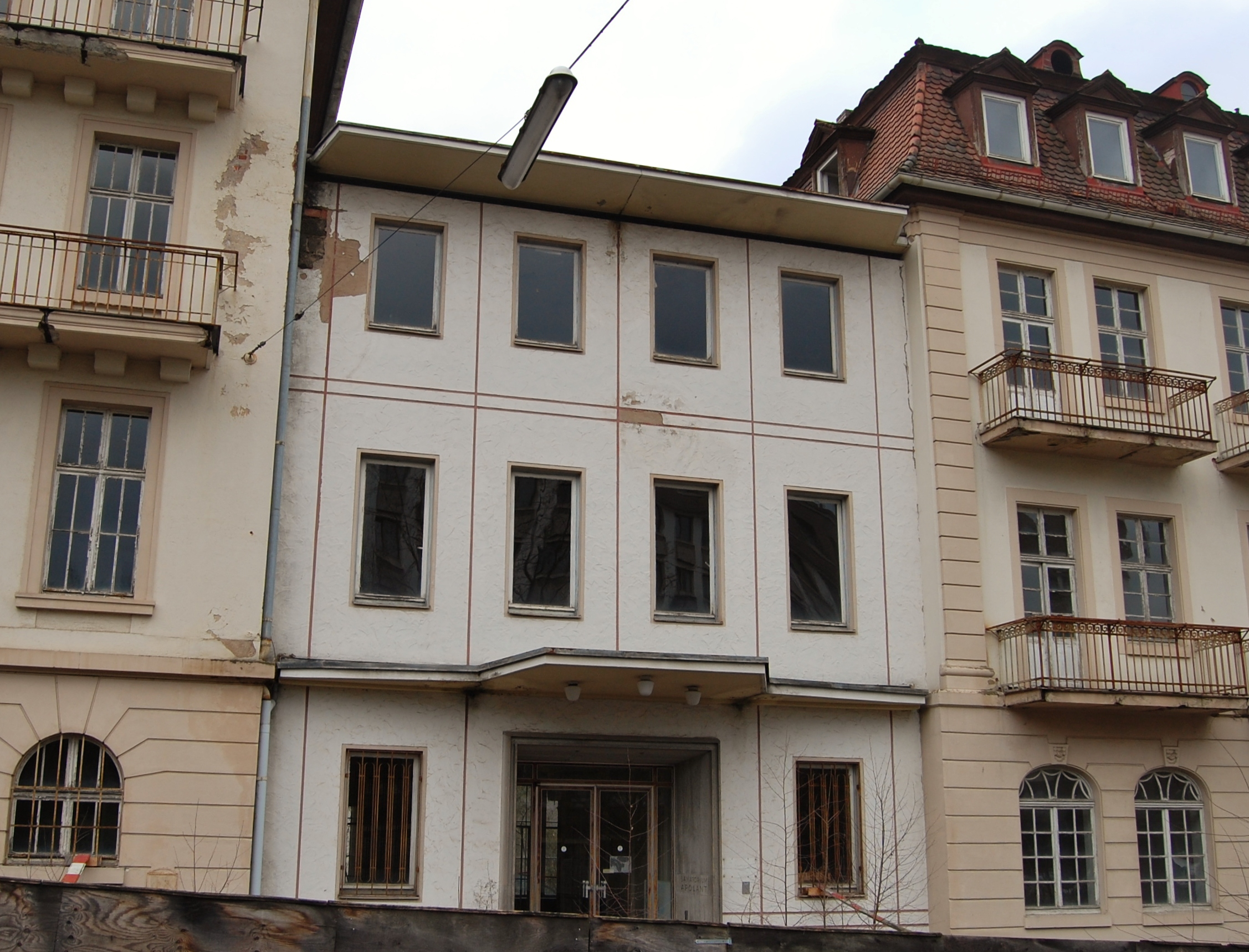 Der Mittelbau aus 1955 im ehemaligen Sanatorium Apolant in Bad Kissingen, Menzelstraße 8-10